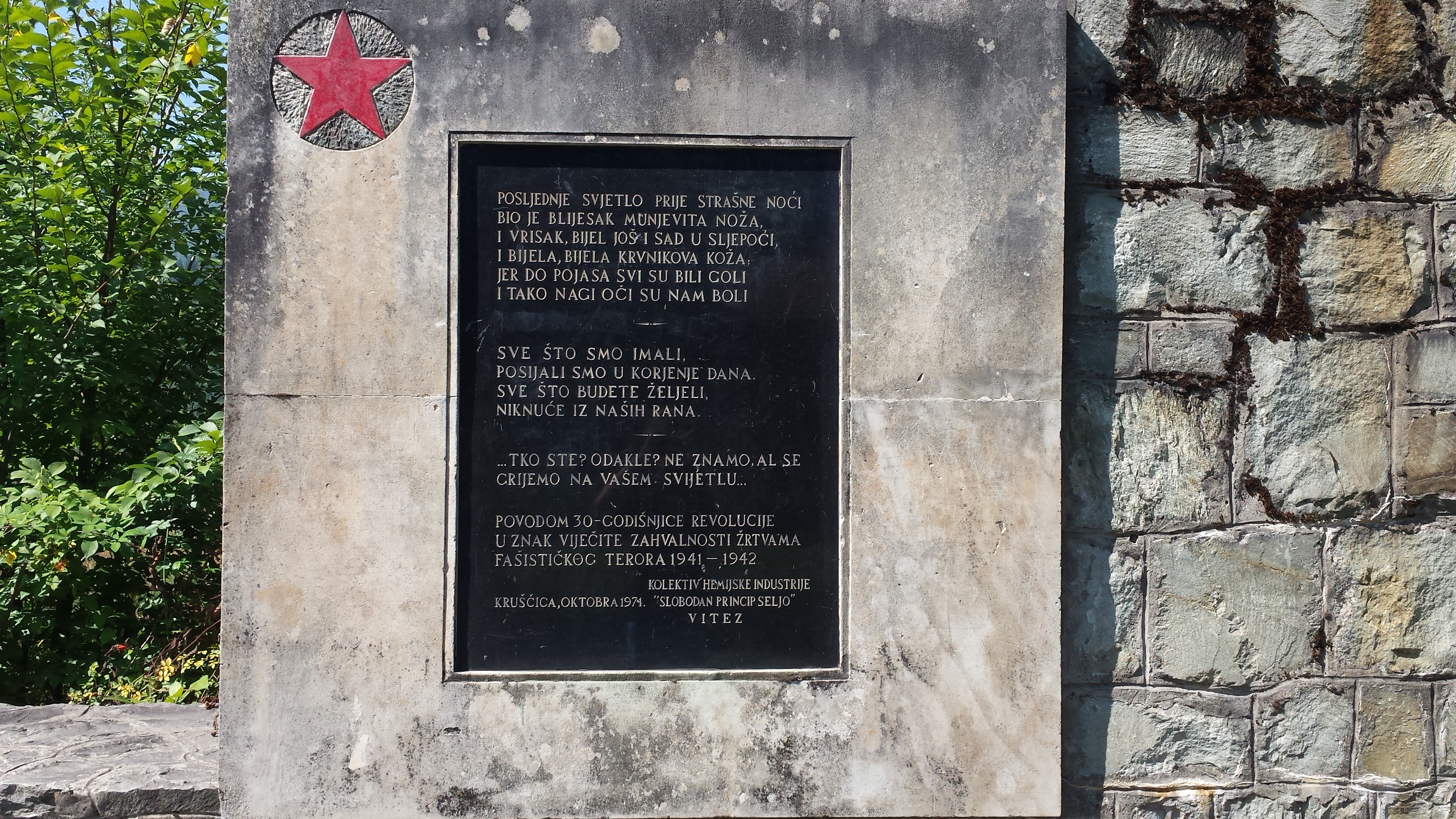 Spomen ploča u bivšem koncentracionom logoru Kruščica u Vitezu, Bosna i Hercegovina